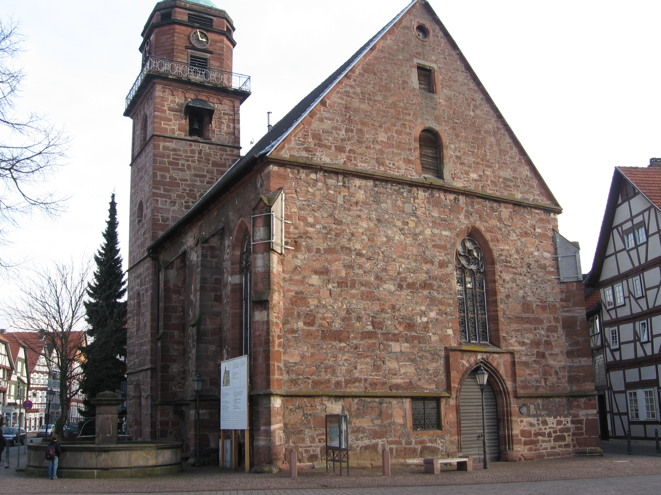 Jakobikirche in Rotenburg vom Rathausplatz aus